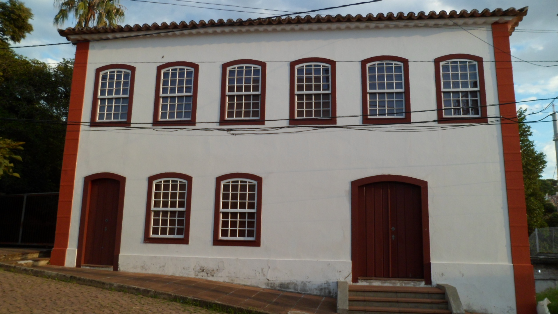 Fachada da construção luso-brasileira do século XIX. Travessa Paraíso, bairro Santa Teresa, Porto Alegre. Foto por: Thamíris Mondin